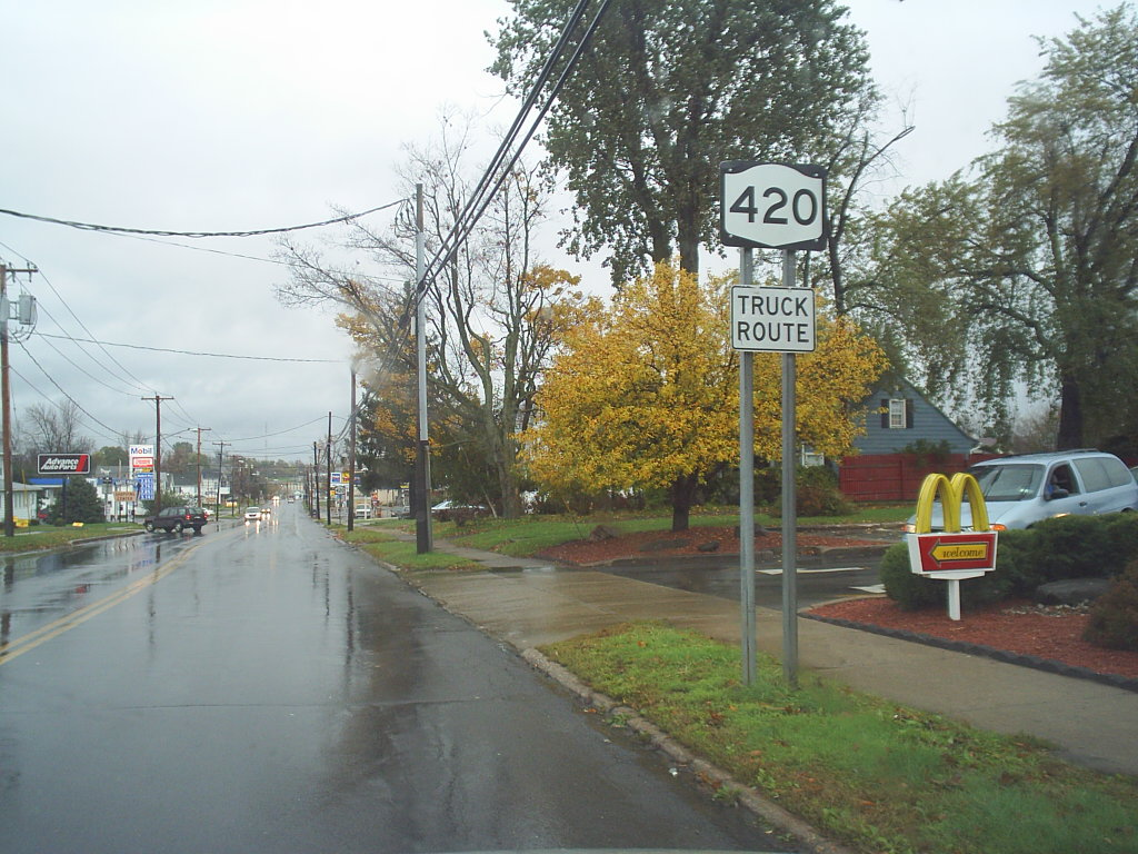 Massena, NY